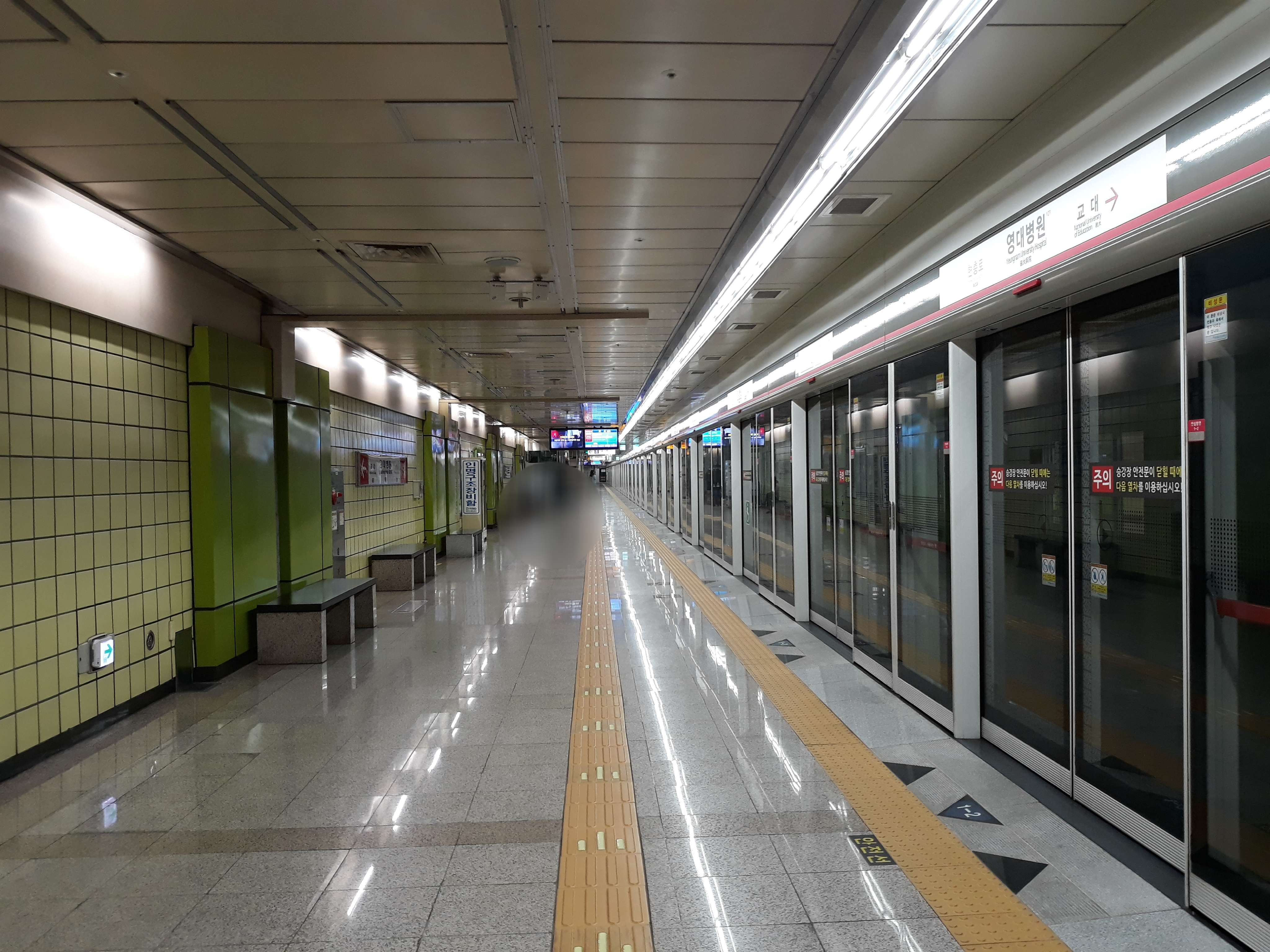 대구 도시철도 1호선 영대병원역 안심 방면 승강장